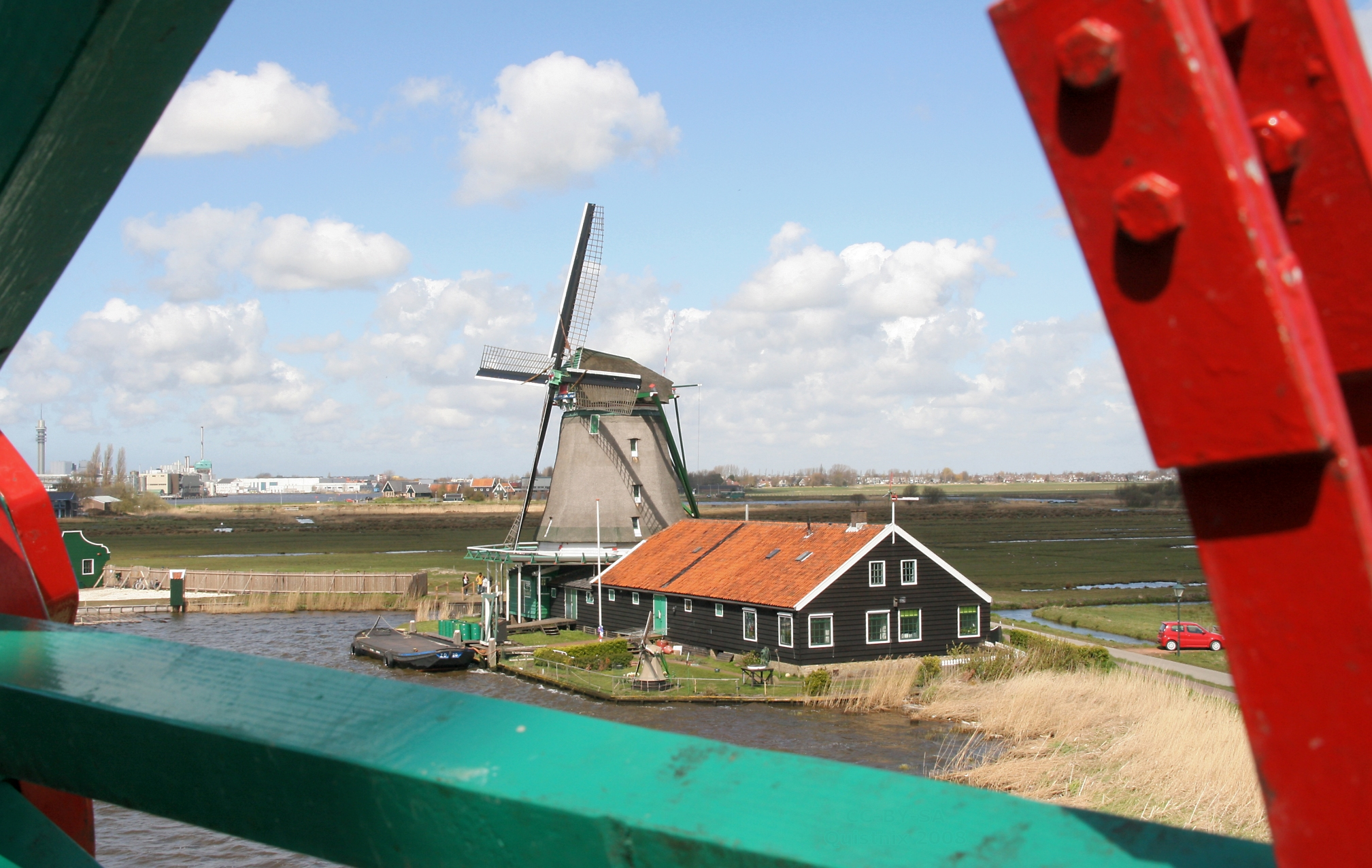 Zaanse Schans: Molen De Zoeker, gezien vanaf De Kat